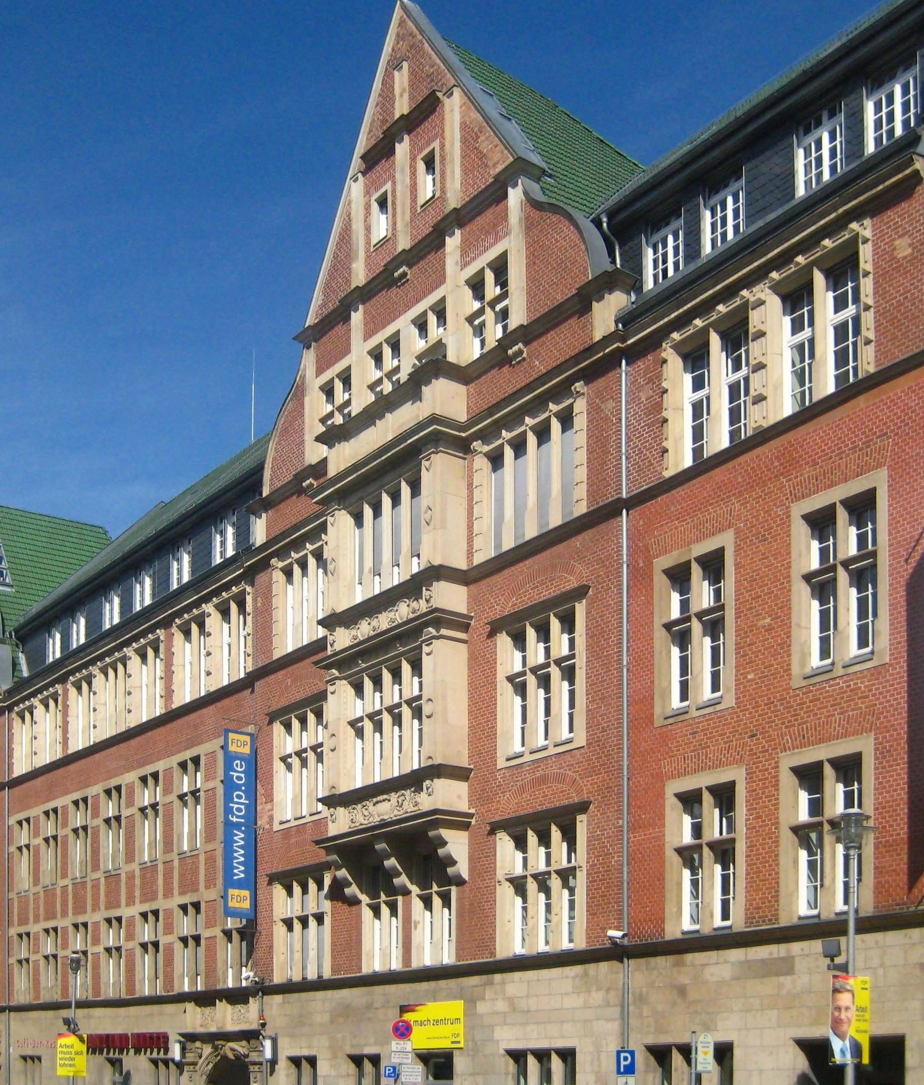 Das Hans-Dietrich-Genscher-Haus (bis 2017: Thomas-Dehler-Haus) in der Reinhardstraße 14/16 in Berlin-Mitte, Sitz der Bundesgeschäftsstelle der FDP. Das Gebäude wurde 1908-1912 für den Dominikanerorden als Neubau des St. Maria-Victoria-Krankenhauses mit angeschlossenem Altenheim errichtet. Eine Spende des vermögenden Ordensunterstützers Carl Fürst zu Löwenstein-Wertheim-Rosenberg erlaubte die Errichtung eines stattlichen Krankenhausbaus in den Formen der deutschen Renaissance anstelle der einfachen Krankenstation, die Dominikanerinnen hier seit den 1880er-Jahren zur Armenversorgung leiteten. Architekt war Casper Clemens Pickel. Zwei übergiebelte Risalite mit Erkern dominieren die langgestreckte Klinker- und Sandsteinfassade. Zwei Relieftafeln über dem Portal erinnern an die Seeschlacht bei Lepanto, in der eine Flotte christlicher Mächte 1571 die türkische Flotte besiegte und damit in der Darstellung der älteren Geschichtsschreibung "das Abendland rettete". Schutzpatronin des Sieges war die "Heilige Maria vom Siege" ("Maria Viktoria"), nach der das Krankenhaus benannt ist. Es wurde bis 1938 betrieben, danach wurde der Komplex von Gliederungen des "Reichsnährstandes" genutzt. Bei der Umfunktionalisierung wurde eine hofseitige Kapelle abgerissen. In der DDR-Zeit war das Gebäude Sitz des Deutschen Bauernverlages der Deutschen Bauernpartei (DBD) und des Deutschen Landwirtschaftsverlages. Seit der Sanierung 1998/1999 nutzt die FDP den Komplex als Parteizentrale. Er ist als Baudenkmal gelistet.